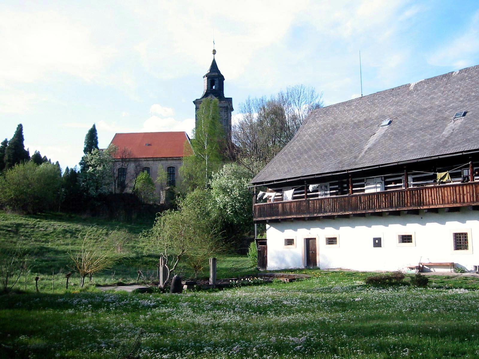 Kostel sv. Petra a Pavla v Lindavě (část města Cvikov, okres Česká Lípa)